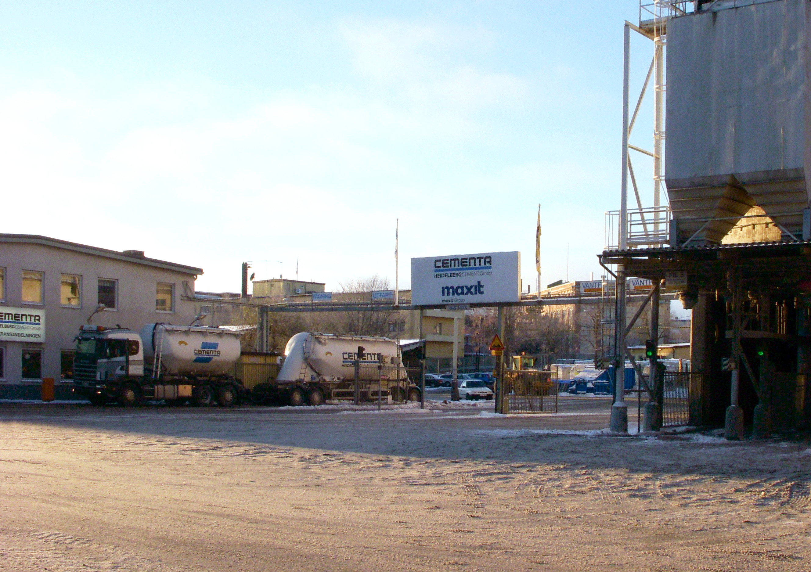 Cementa Liljeholmen